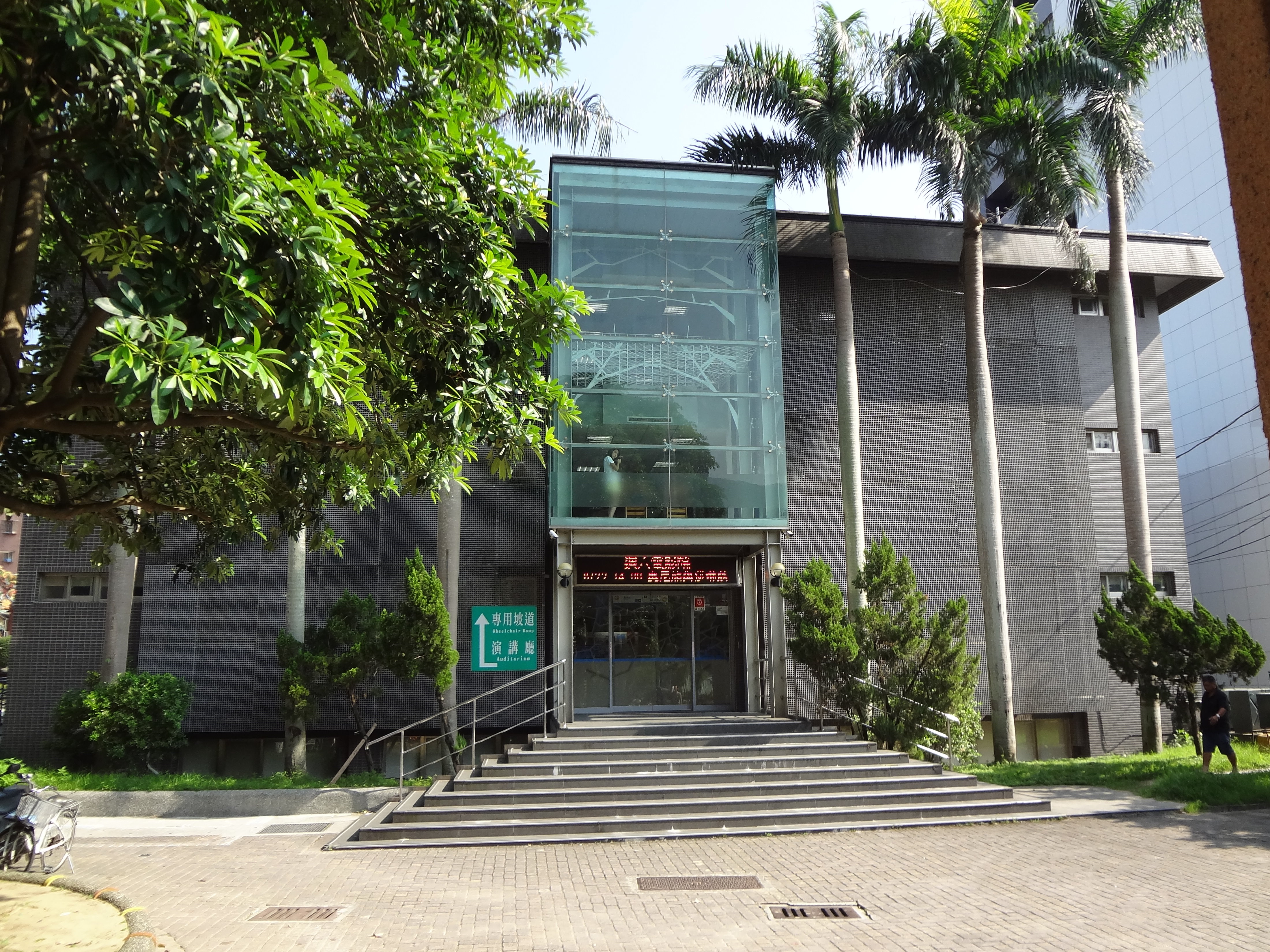 新北市立圖書館汐止大同分館，位於新北市汐止區大同路二段451號。